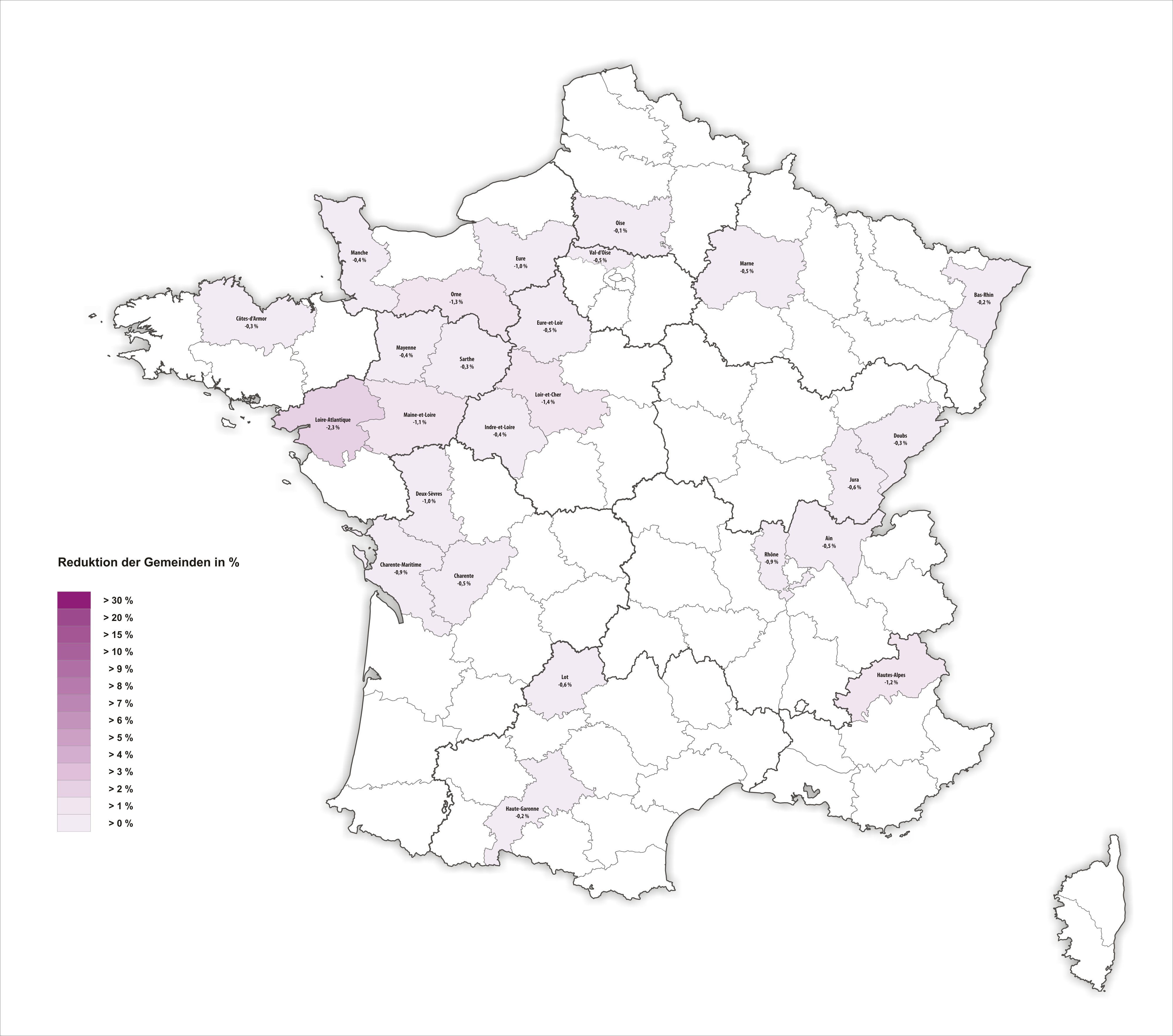 Reduktion der Gemeinden in Frankreich durch Fusionen pro Département 2018